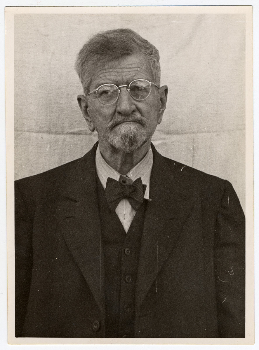 Claus Karl Schilling, auch Klaus Schilling geschrieben, (* 5. Juli 1871 in München; † 28. Mai 1946 in Landsberg am Lech) war ein promovierter Tropenmediziner aus Deutschland und verfügte über eine Forschungsstation im Konzentrationslager Dachau. Schilling wurde im Dachau-Hauptprozess zum Tode verurteilt und hingerichtet.